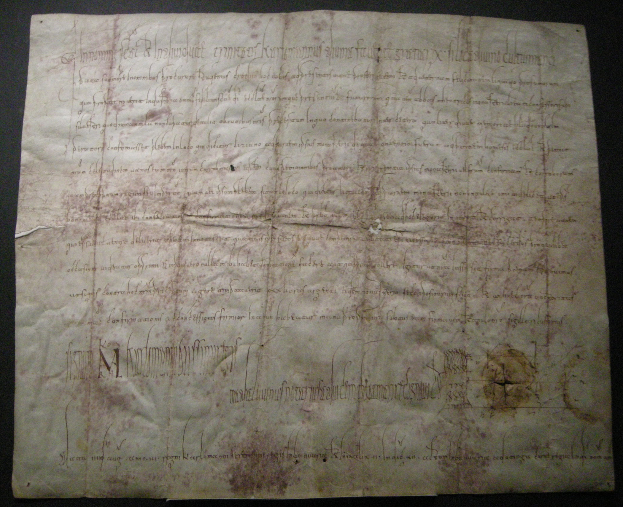 Museo diocesano nonantola, carlomann conferma il possesso della pieve di lizzano al monastero di nonantola, anno 879